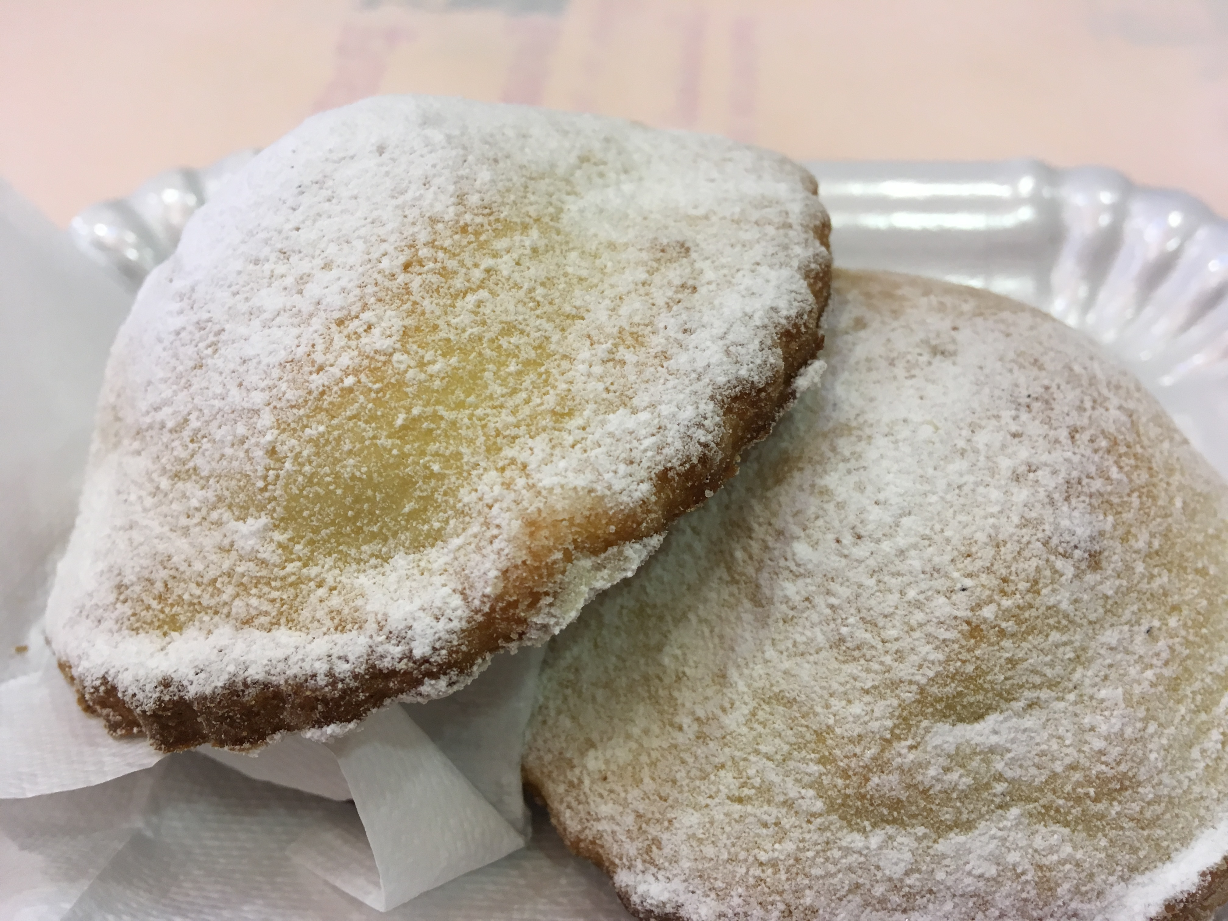 Le genovesi del borgo ericino, sono dolci di pasta frolla con all’interno una delicata crema pasticcera.